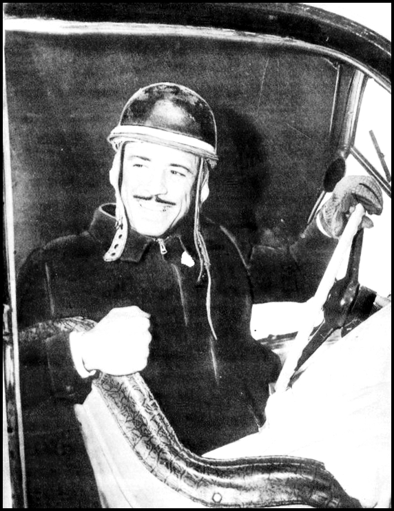 Oscar Alfredo Gálvez - fotografiado al volante de su cupé "Ford" - año 1953.